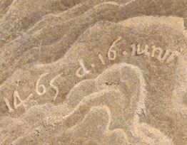 Camera picta, data inizio lavori